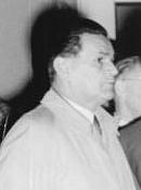 Zentralbild/Zühlsdorf 23.5.1957 CSR-Delegation in Nordhausen und Weimar. Das Reiseziel der tschechoslowakischen Regierungsdelegation war am 22.5.1957 der VEB Schwermaschinenbau Nordhausen, die Stadt Weimar und Eisleben. UBz.: Die Delegation besucht das Goethehaus in Weimar. Links: Ministerpräsident Viliam Siroky